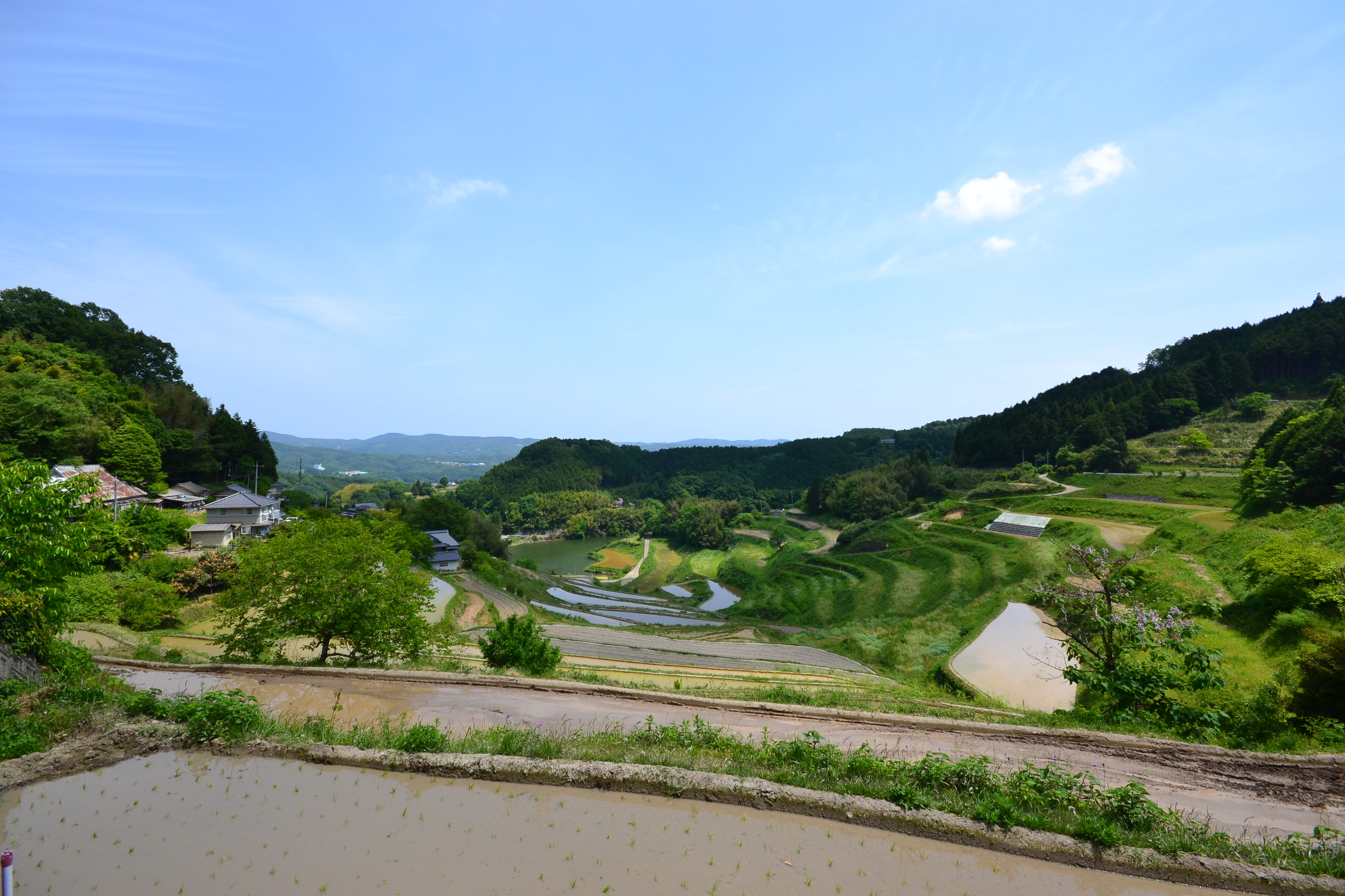 久米南町北庄地区の棚田